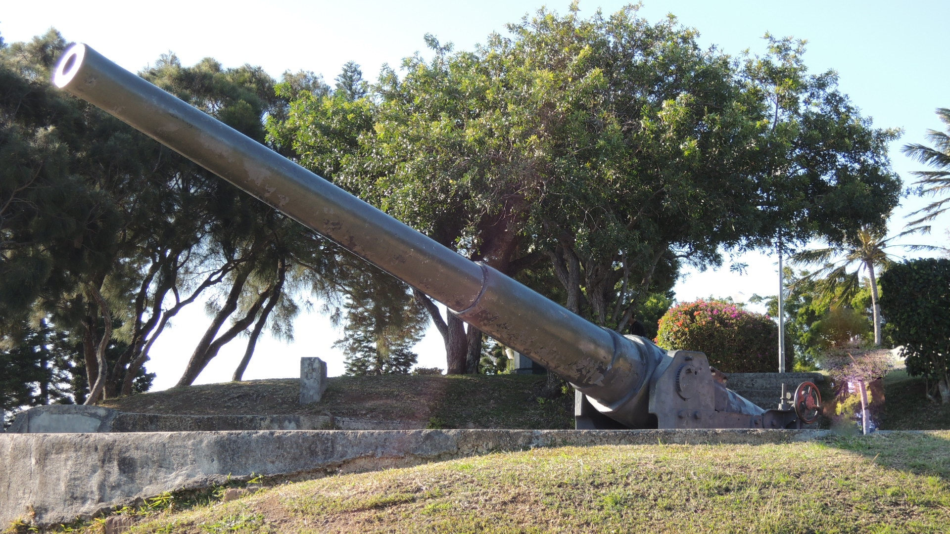 Canon datant de la Seconde Guerre Mondiale au Mont du Ouen-Toro